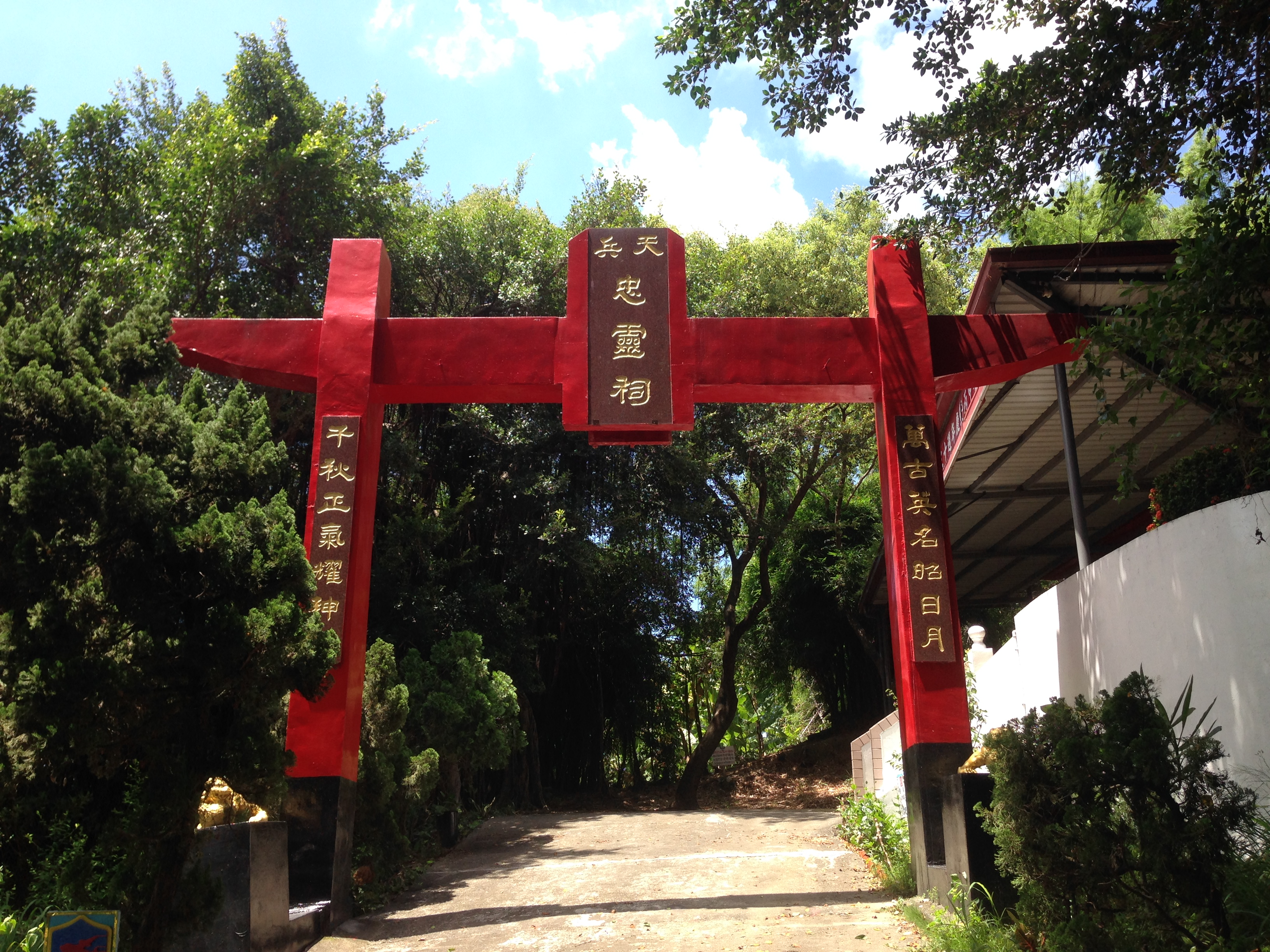 中文（台灣）: 天兵忠靈祠牌坊